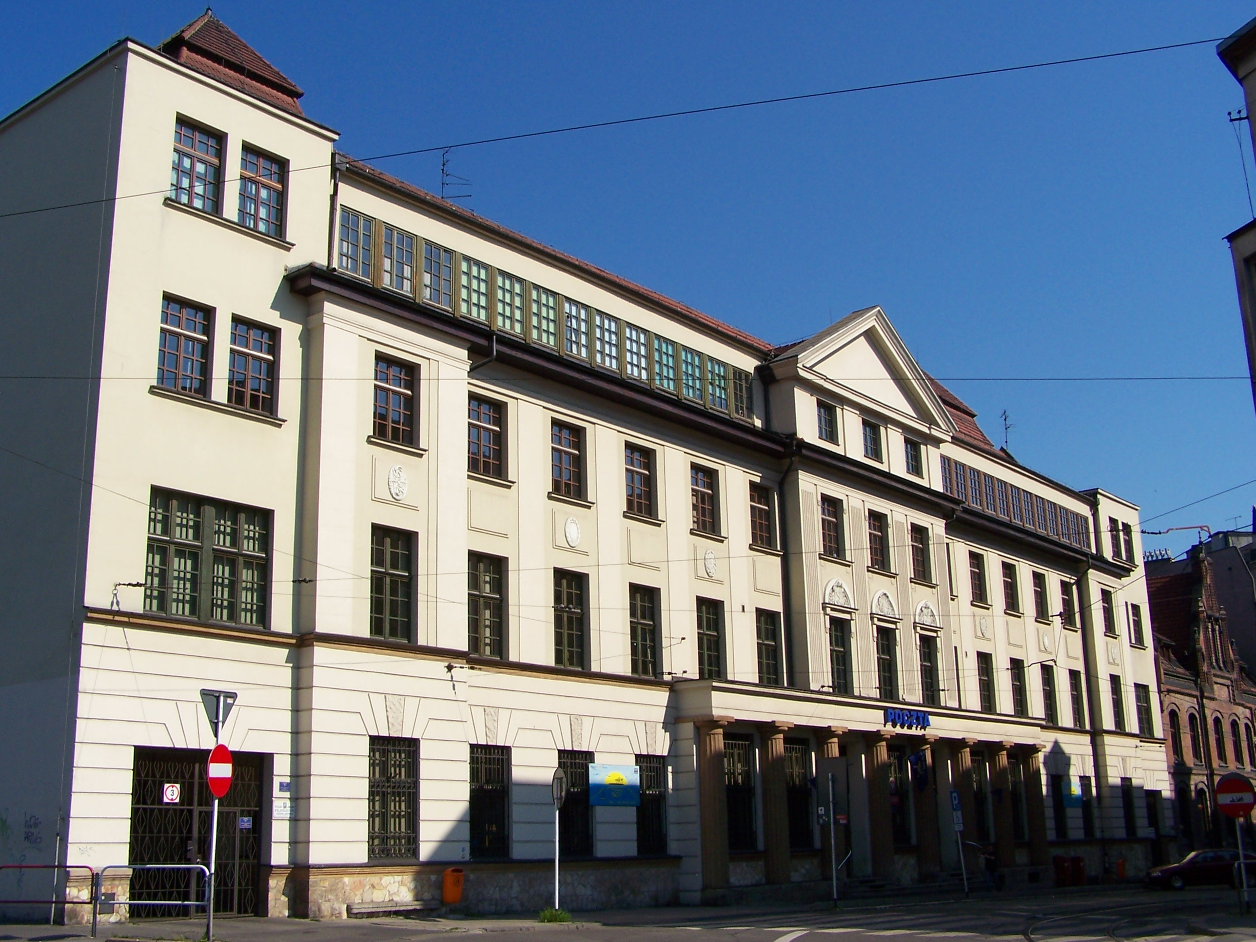 Gmach Poczty Polskiej w Katowicach.